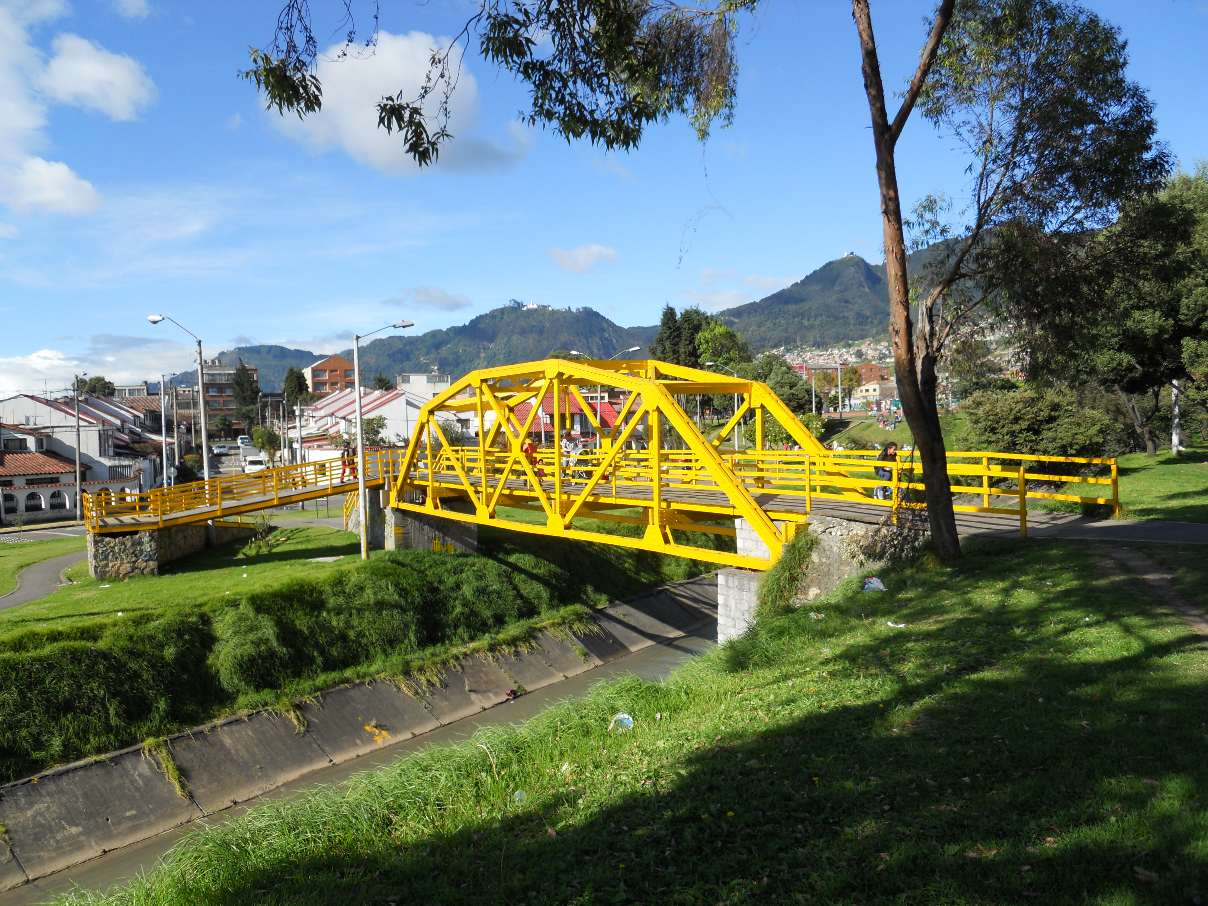 Puente sobre el río Fucha Bogotá, carrera 11, localidad de Antonio Nariño.